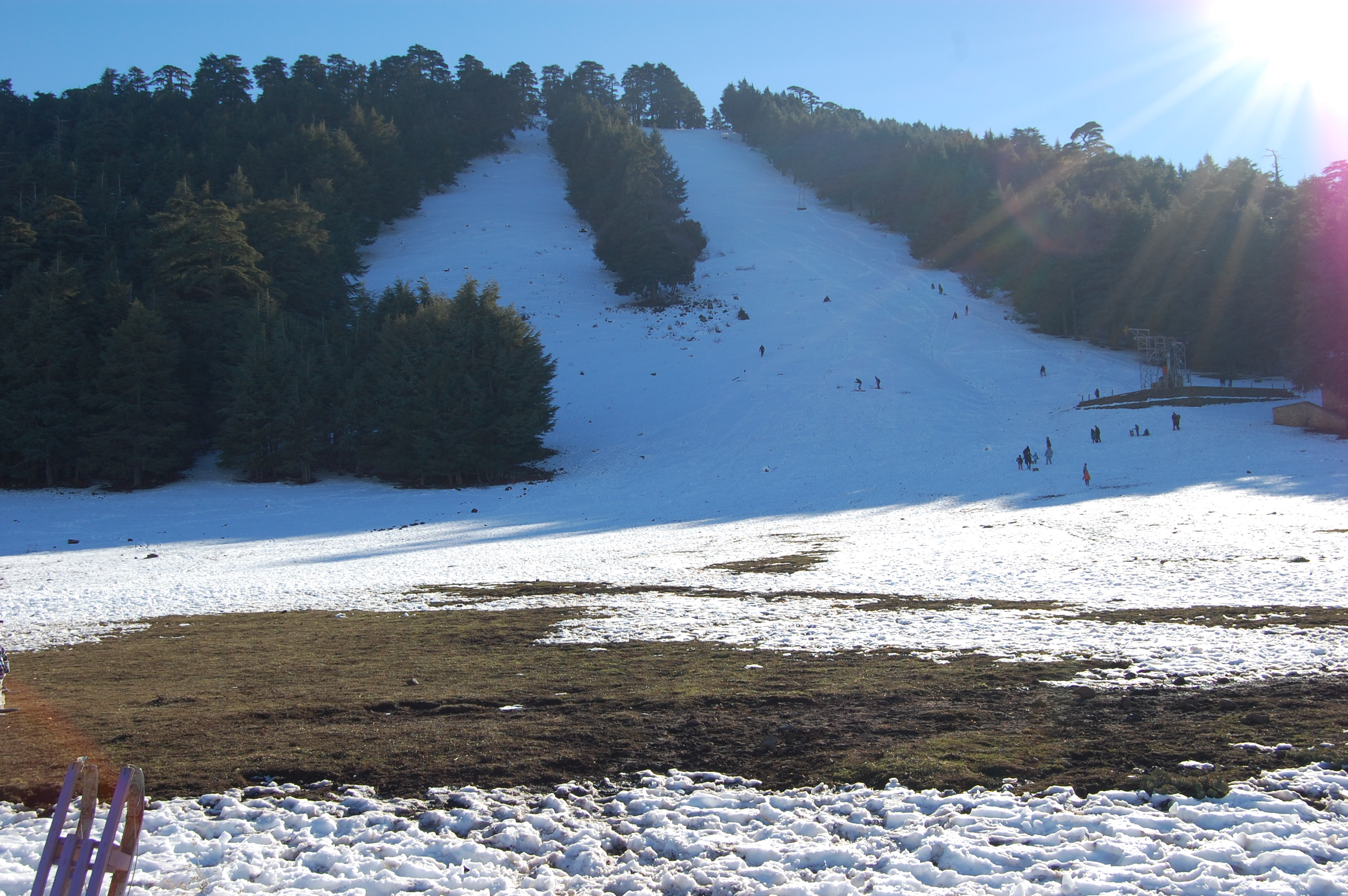 Michlifen